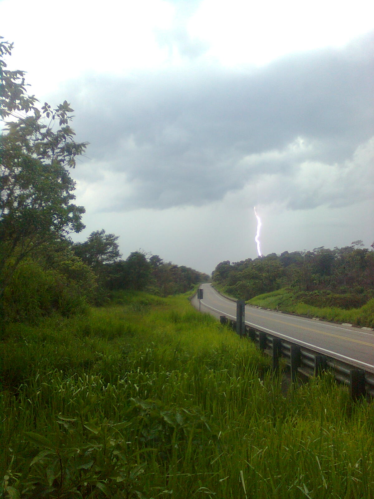 Autopista Las Choapas-Tuxtla Gutierrez, kilometro 91, Tormenta electrica en la sierra